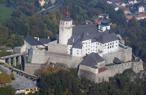 Forchtenstein (Fraknó), Austria, aerialphotography